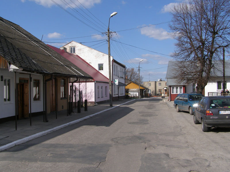 PL, Poland, lubelskie, Wojsławice